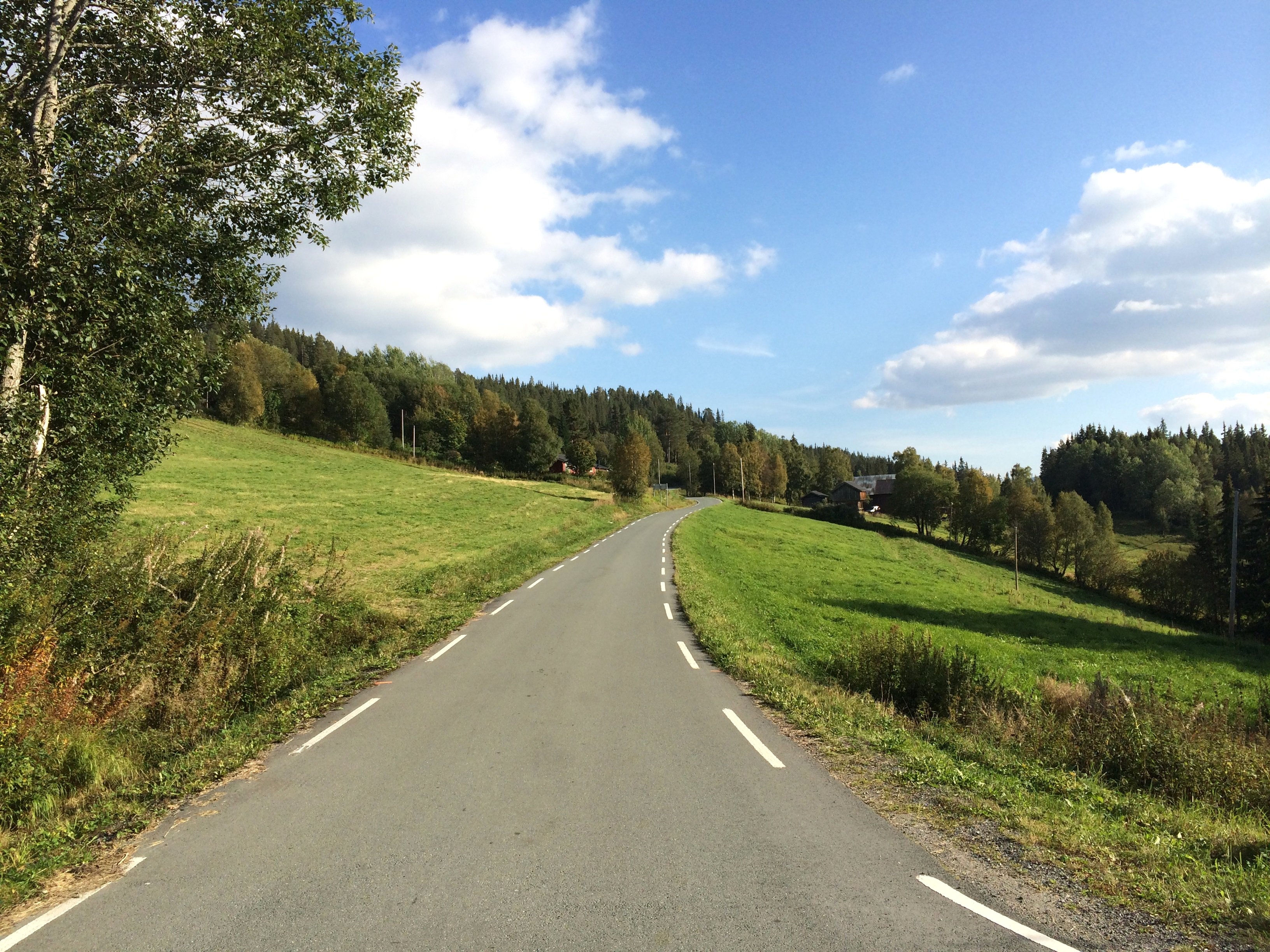 Fylkesvei 854 nær nordvestenden ved Hylland